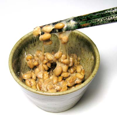 Natto con bacchette